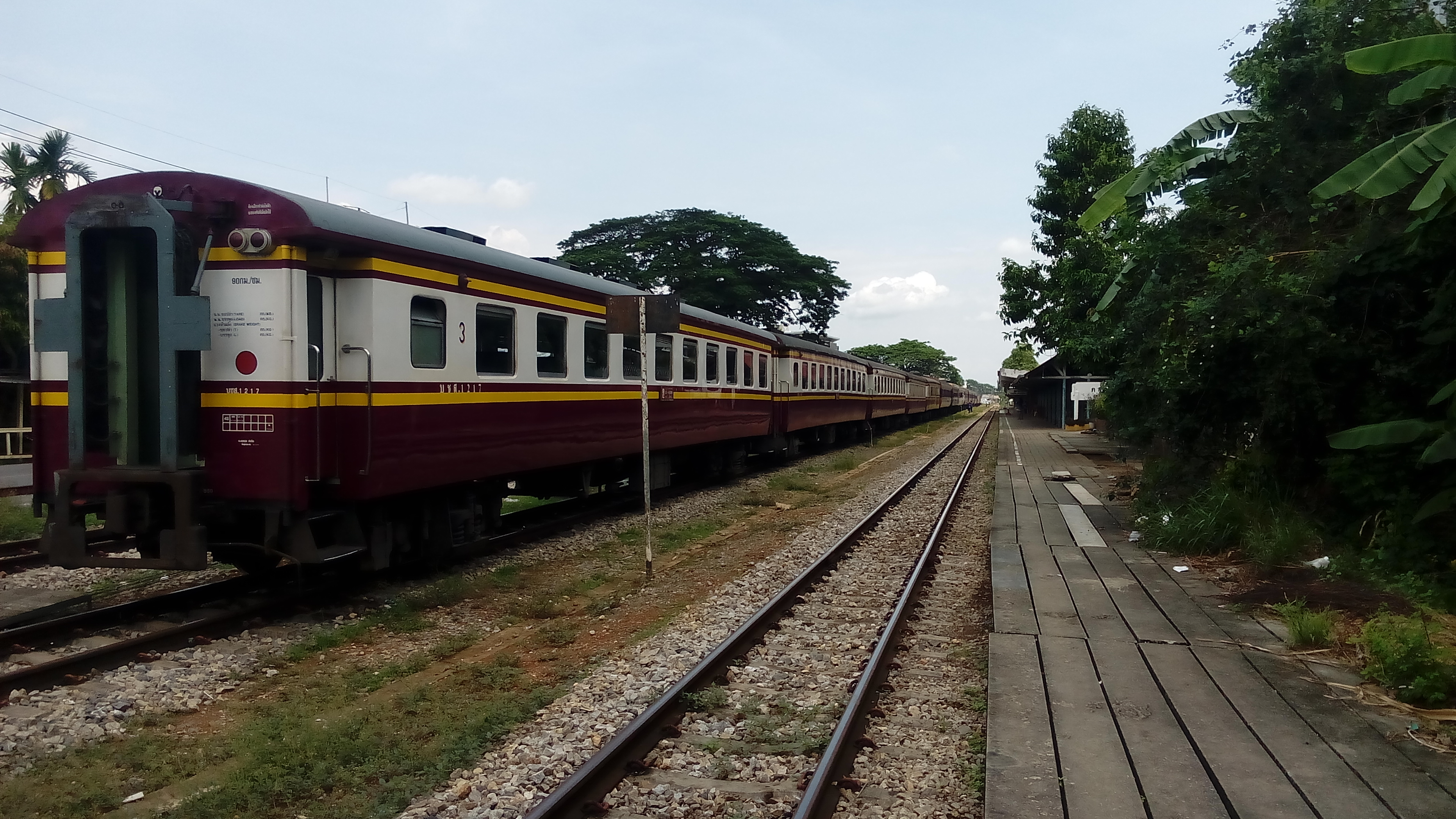 ขบวนรถไฟ